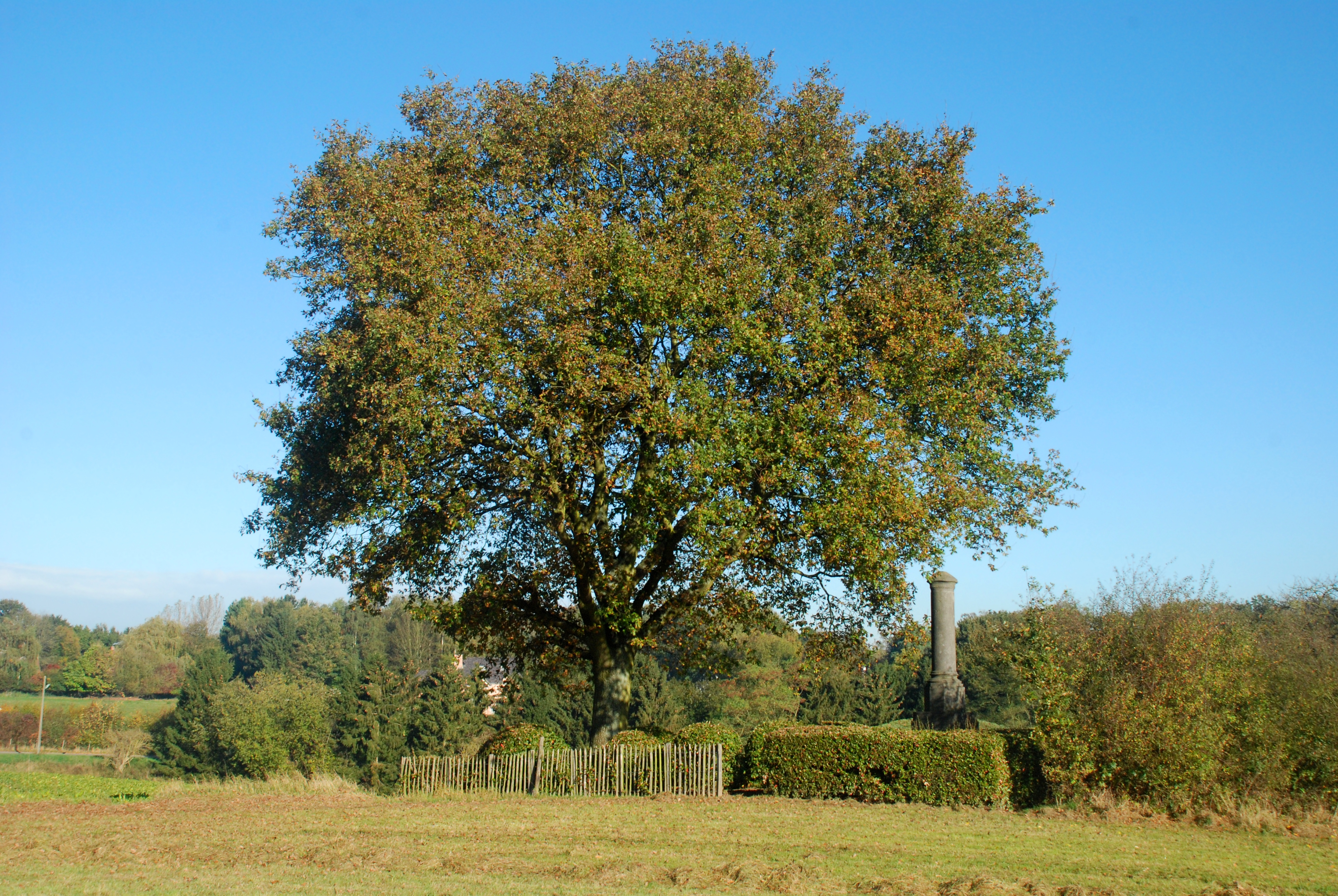 Belgique - Brabant wallon - Lasne - Monument au comte von Schwerin (bataille de Waterloo)